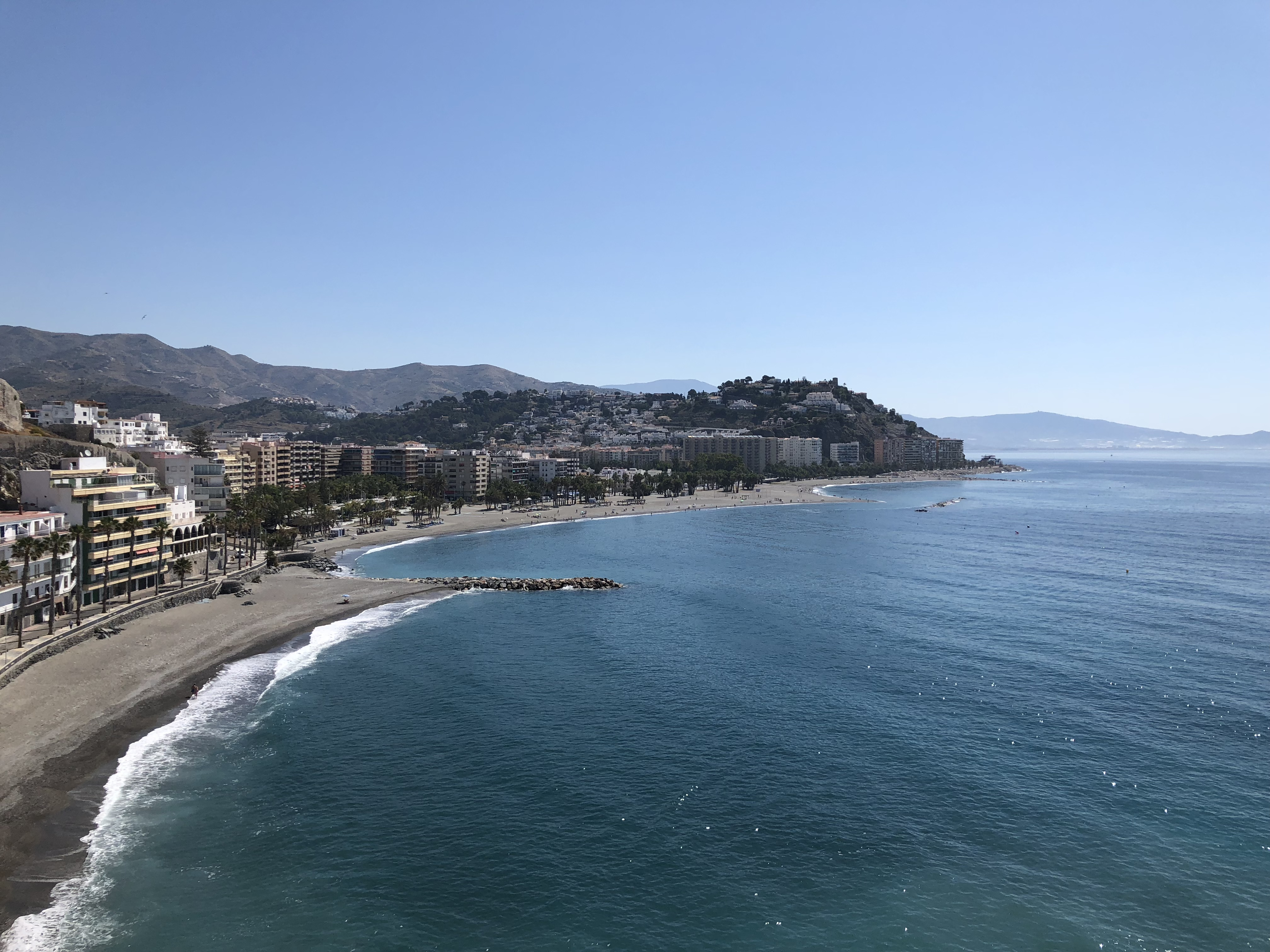 Almuñécar (Espagne) en juin 2018